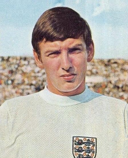 Martin Peters (1970), 'Mexico 70, World Cup Story', Panini figurina.